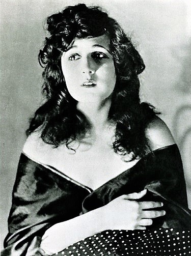 Marion Aye